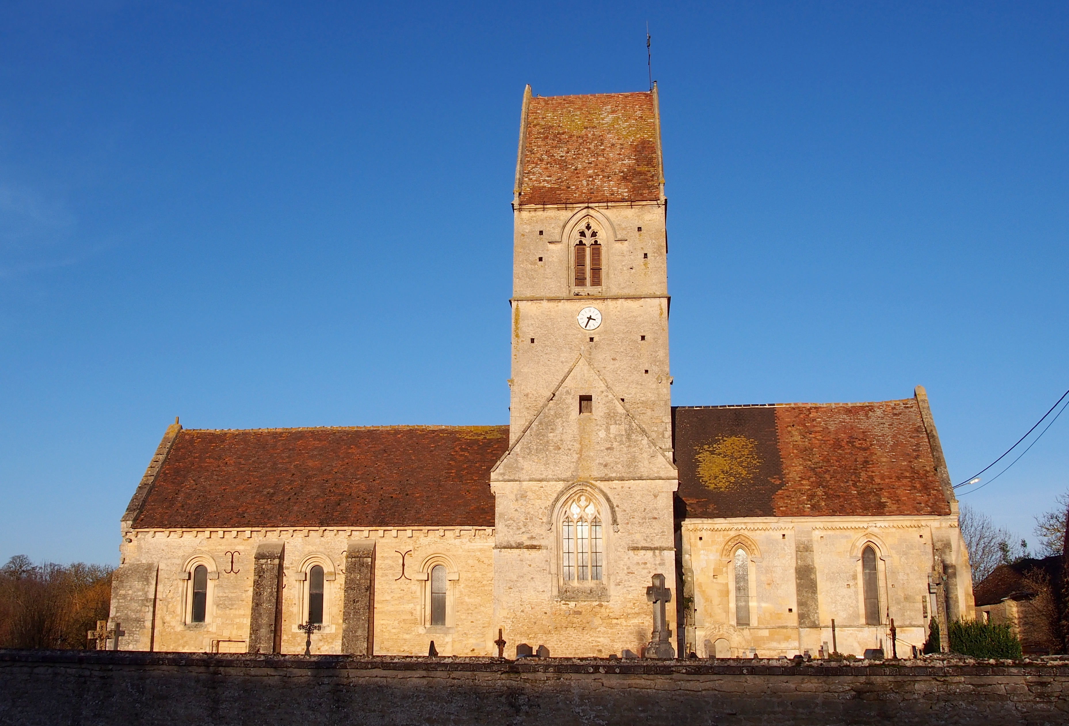 Sassy (Normandie, France). L'église Saint-Gervais-et-Saint-Protais.